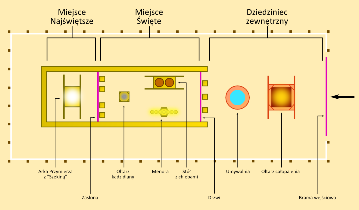 Kolorowy schemat Przybytku Mojżeszowego